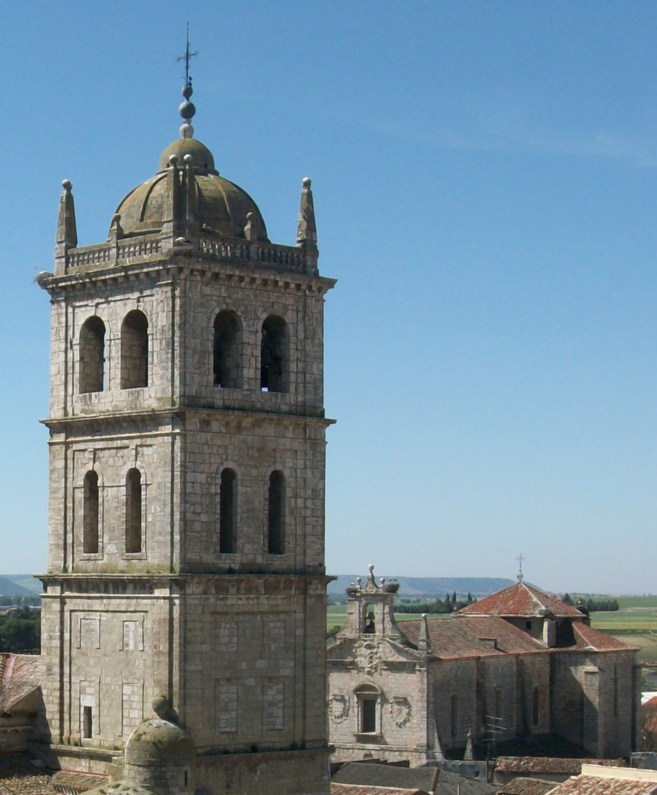 Torre de la iglesia parroquial de Santa María de la Asunción e iglesia del convento de San Agustín de Dueñas.